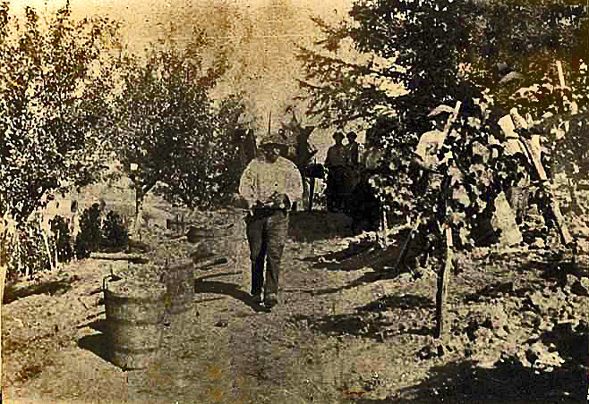 Une vigne à Port-Sainte-Foy, vers 1880, où les ceps de vignes sont taillés en encorbellement autour des échalas.